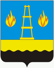 Blason de Otradny